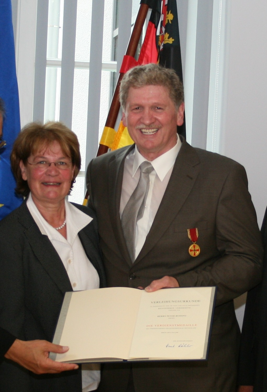 Peter Hussing Verleihung des Bundesverdienstkreuz 11.07.2008 in Mainz